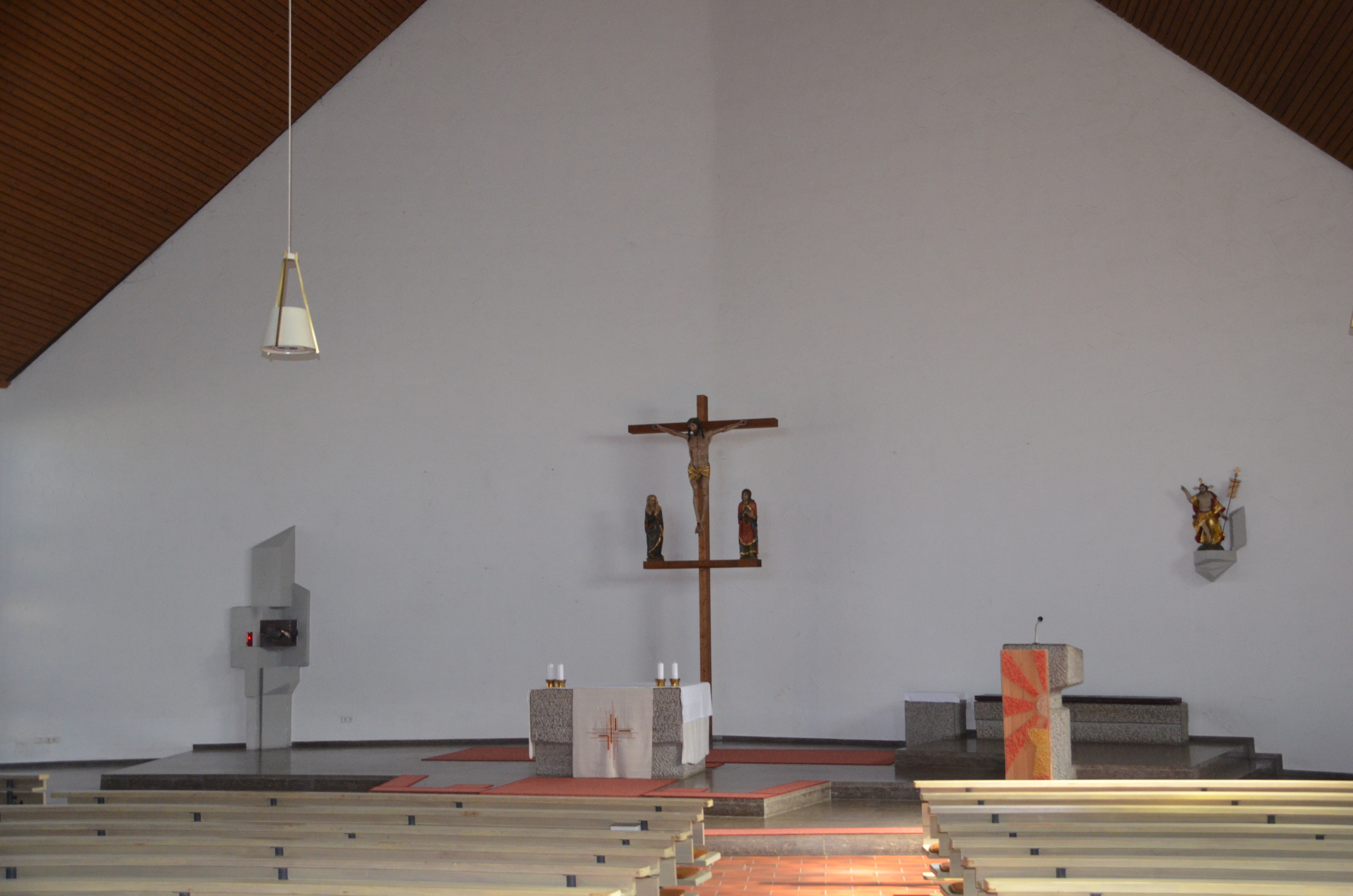 Innenraum von Maria Königin Rehnenhof (Schwäbisch Gmünd)